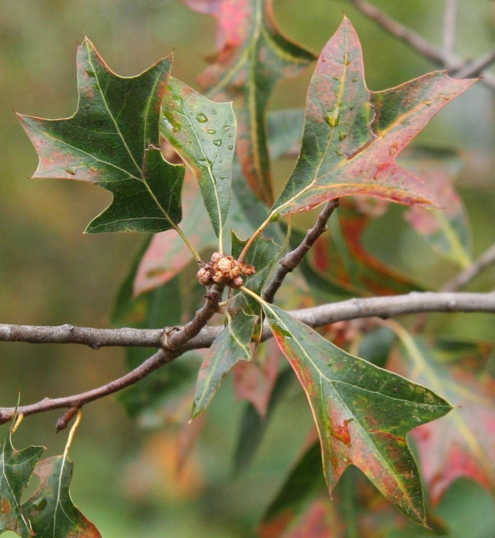 Quercus ilicifolia Detail